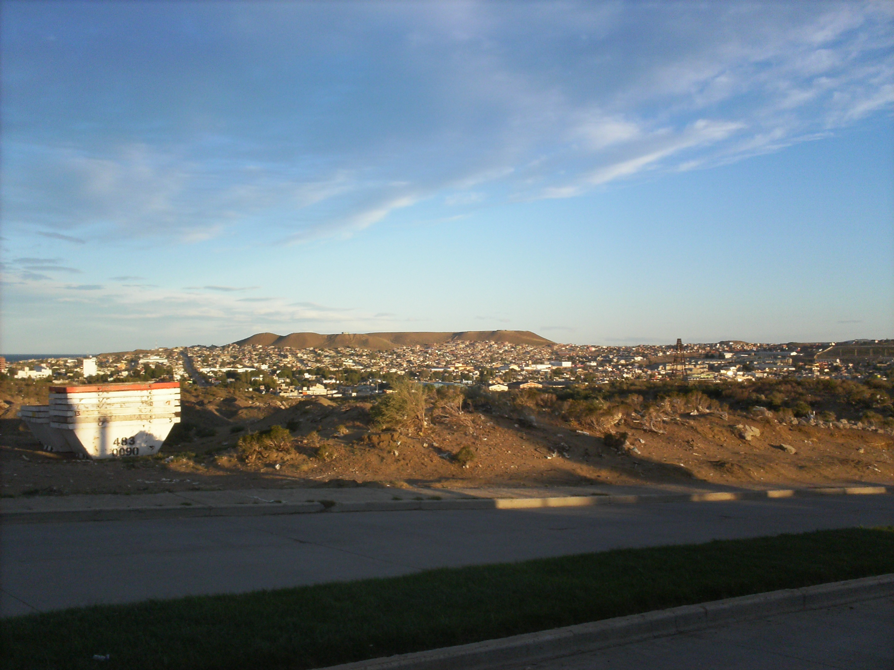 imagen de la geografia de la ciudad caletense y su extension